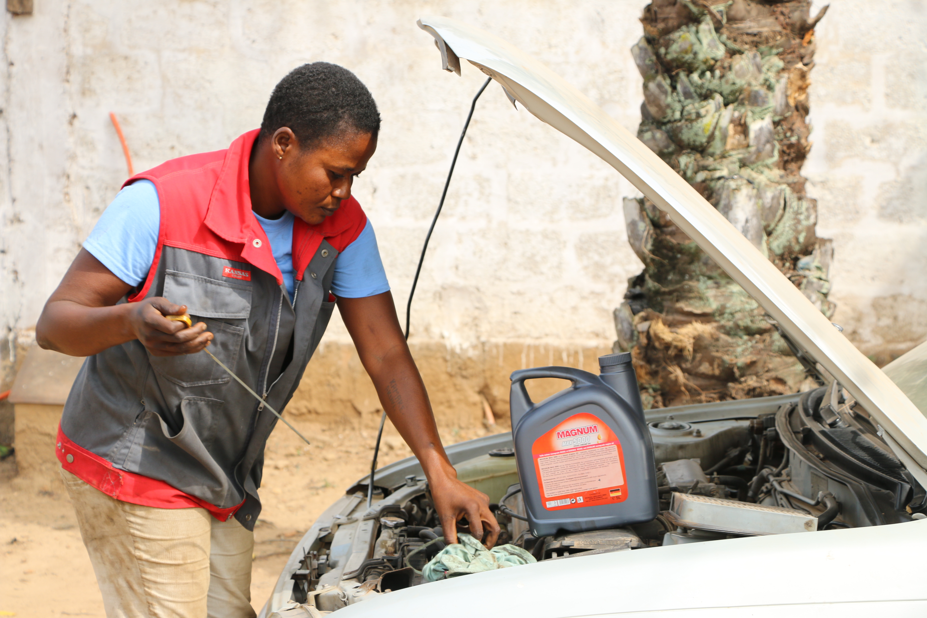 Mécanicienne garagiste This is an image of "African people at work" from Togo